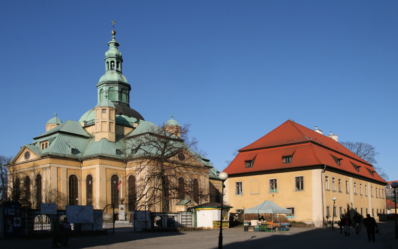 Gnadenkirche (1709-18 erbaut) und Kantorhaus in Jelenia Góra (Hirschberg)